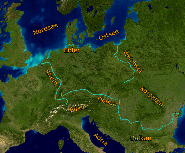 Karte Mitteleuropas